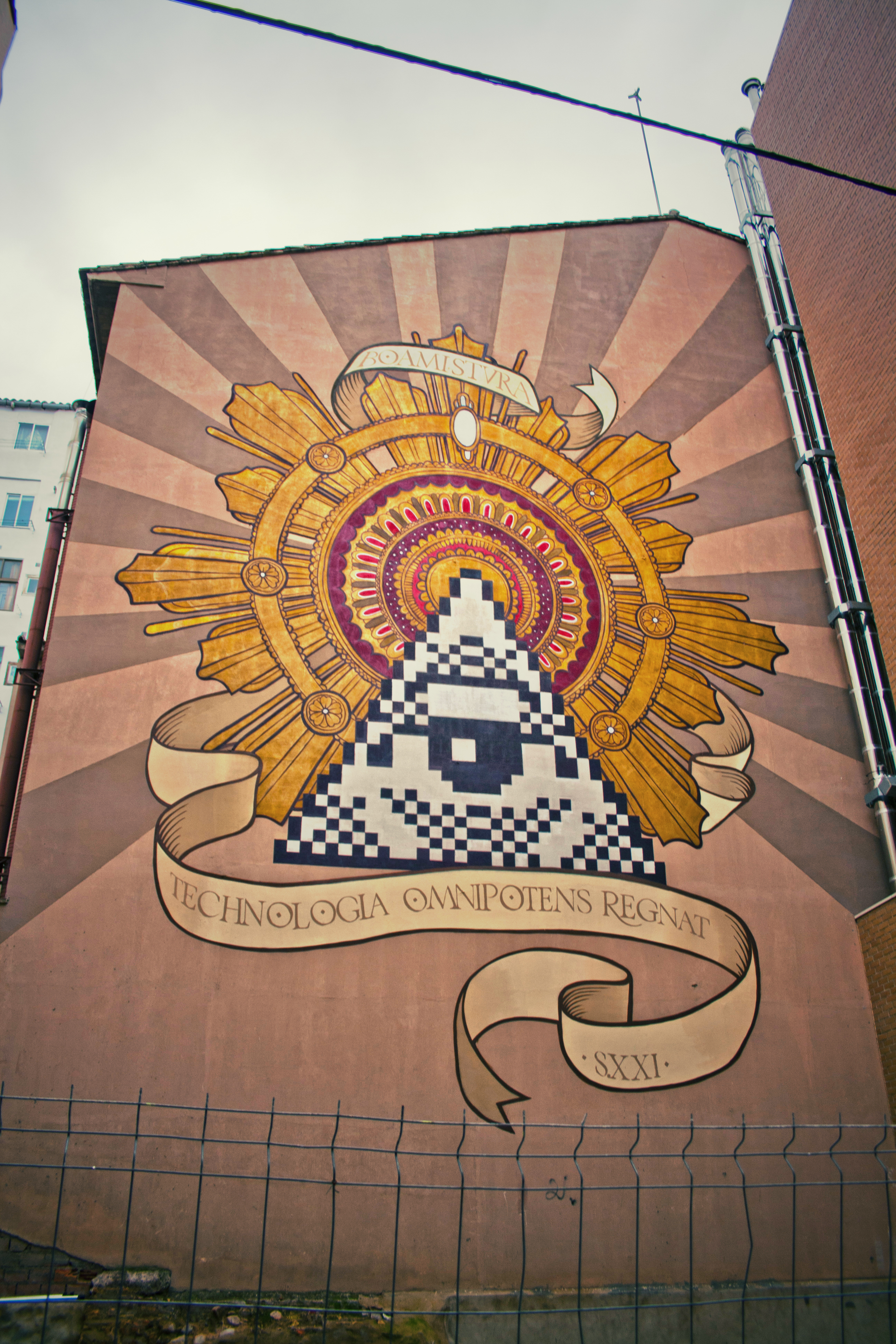 Zaragoza, España. (Technologia Omnipotens Regnat)